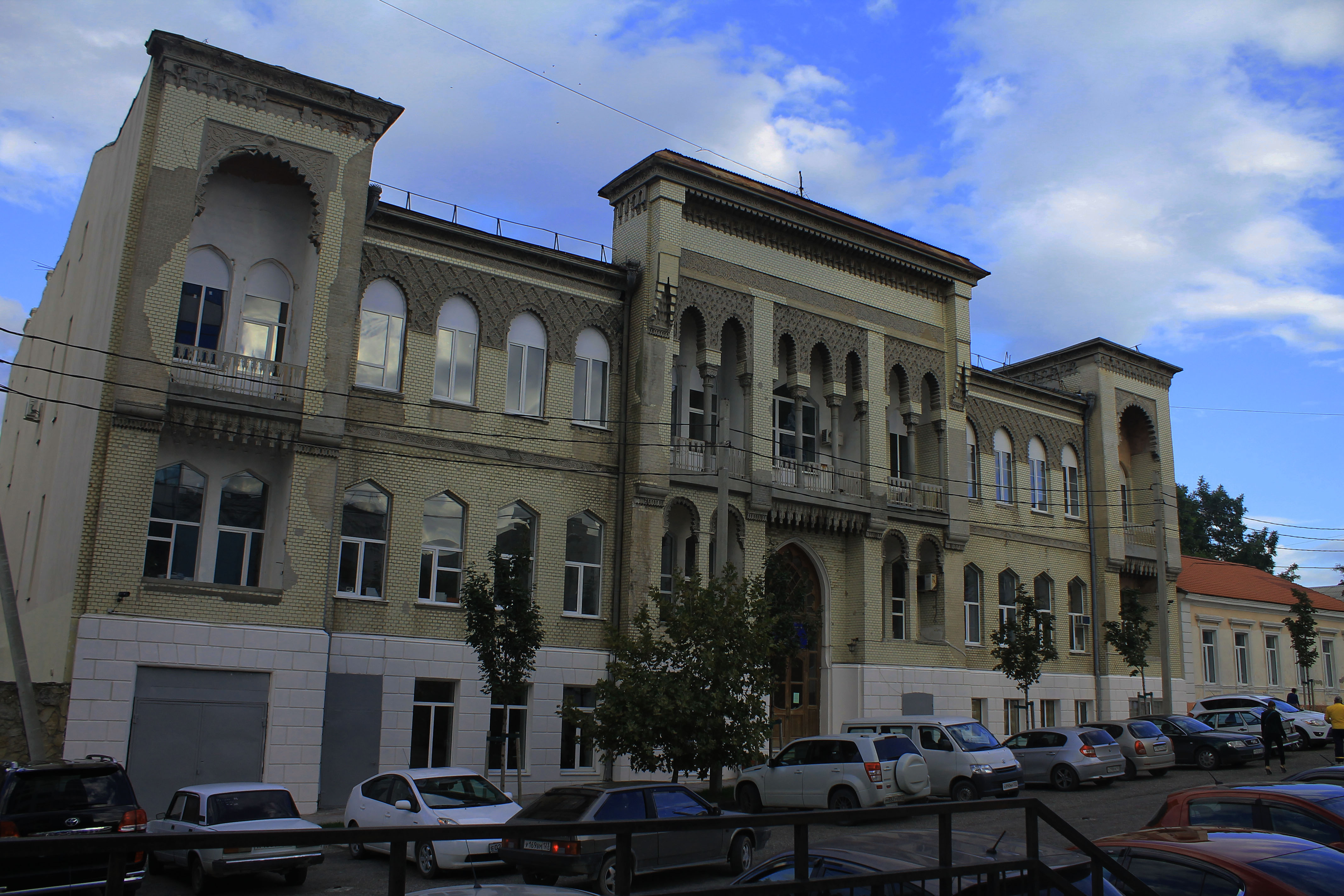 Здание новороссийского филиала общетехнического факультета краснодарского политехнического института (Краснодарский край, Новороссийск, улица Карла Маркса, 20)